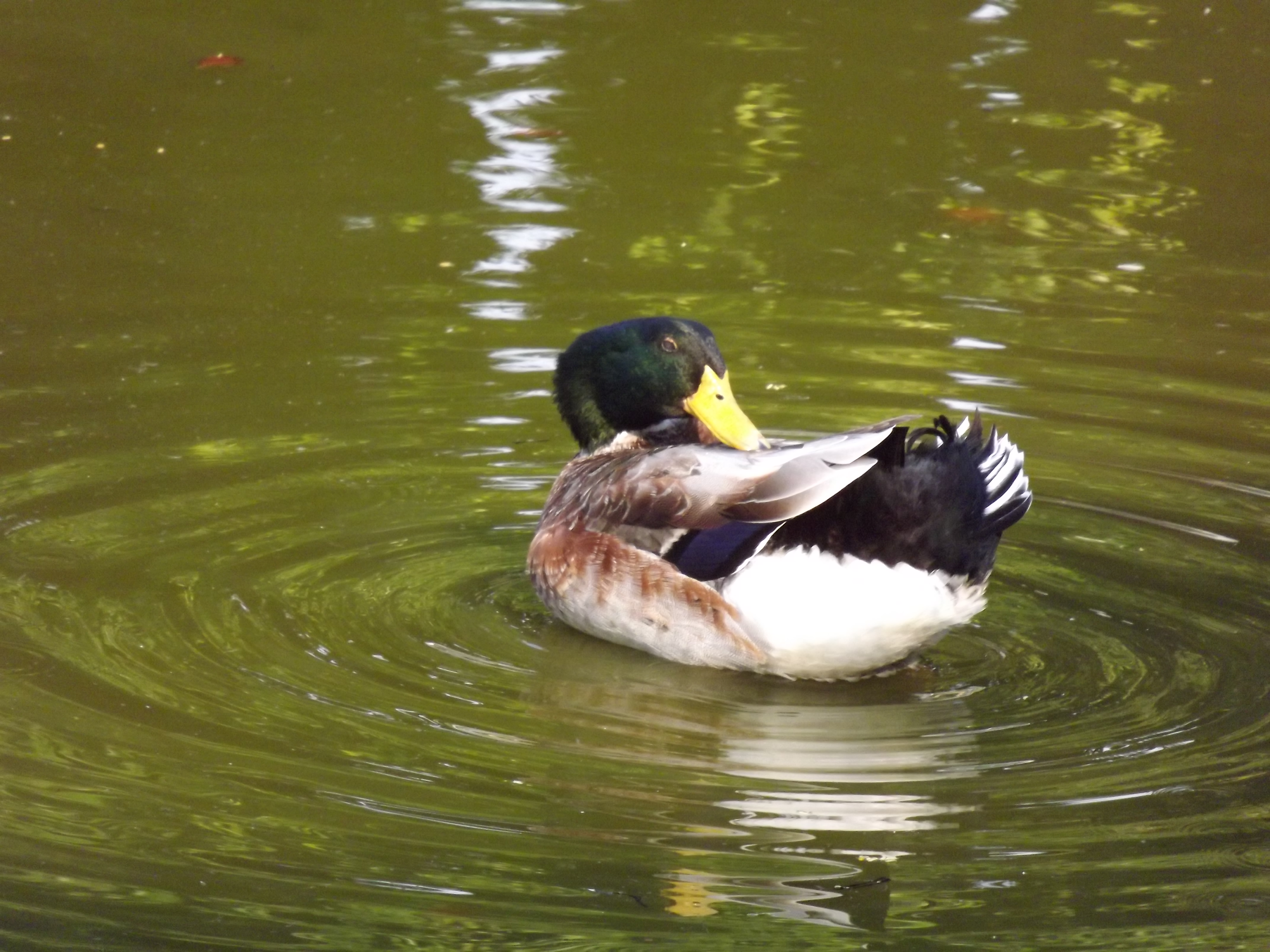 حديقة حيوان النزهة - الاسكندرية